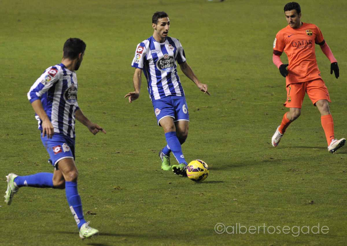 José Rodríguez 6 Pedro 7